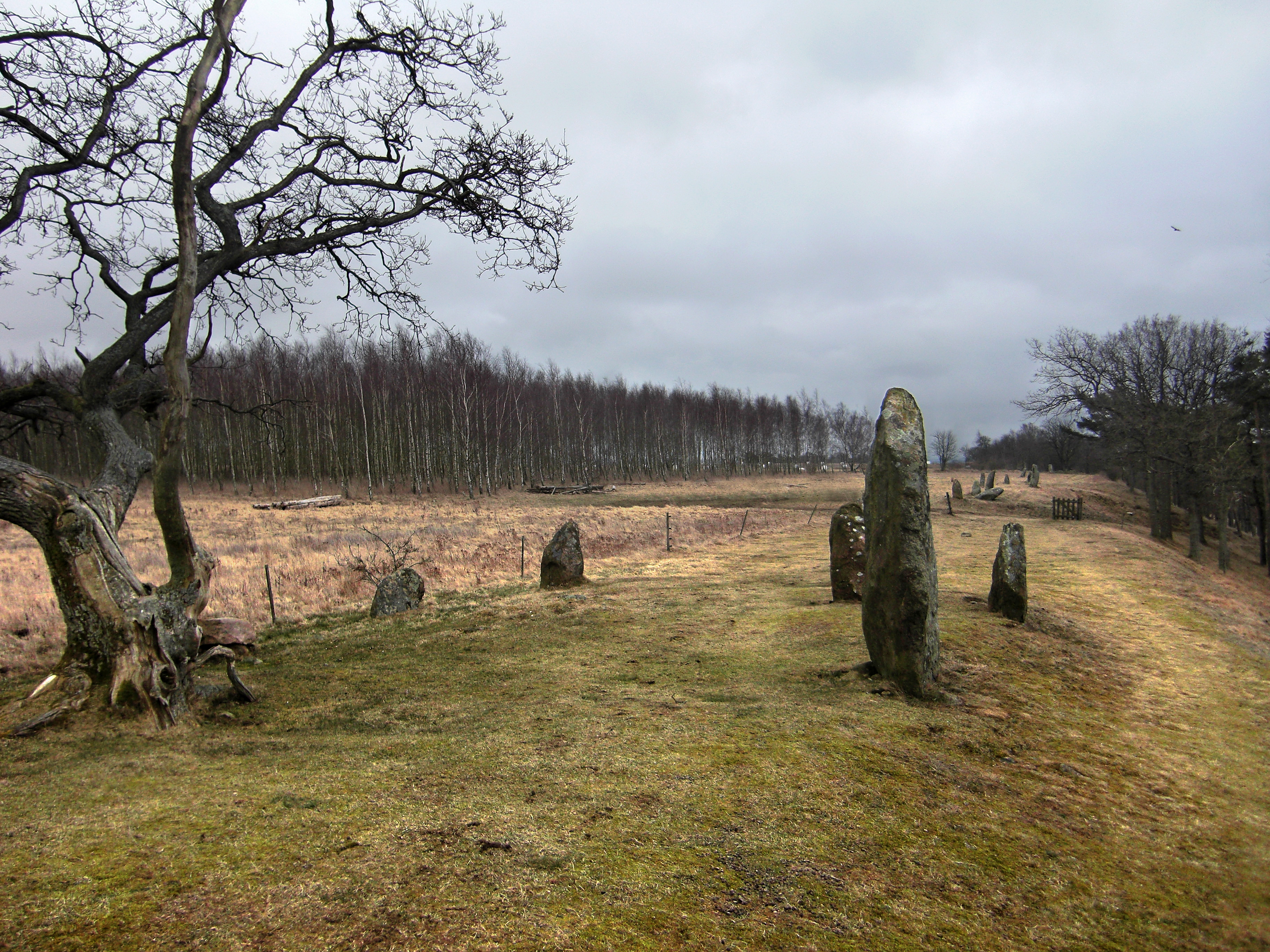 Gravfältet Örelids stenar (Raä-nr Tjärby 37:1) i Tjärby socken, Höks härad, Laholms kommun, Halland, Sverige. Den flygande fågeln till höger i bild är en röd glada (Milvus milvus).